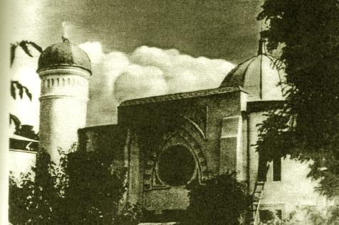 Мечеть в Ростове-на-Дону, снимок 1930-х годов.